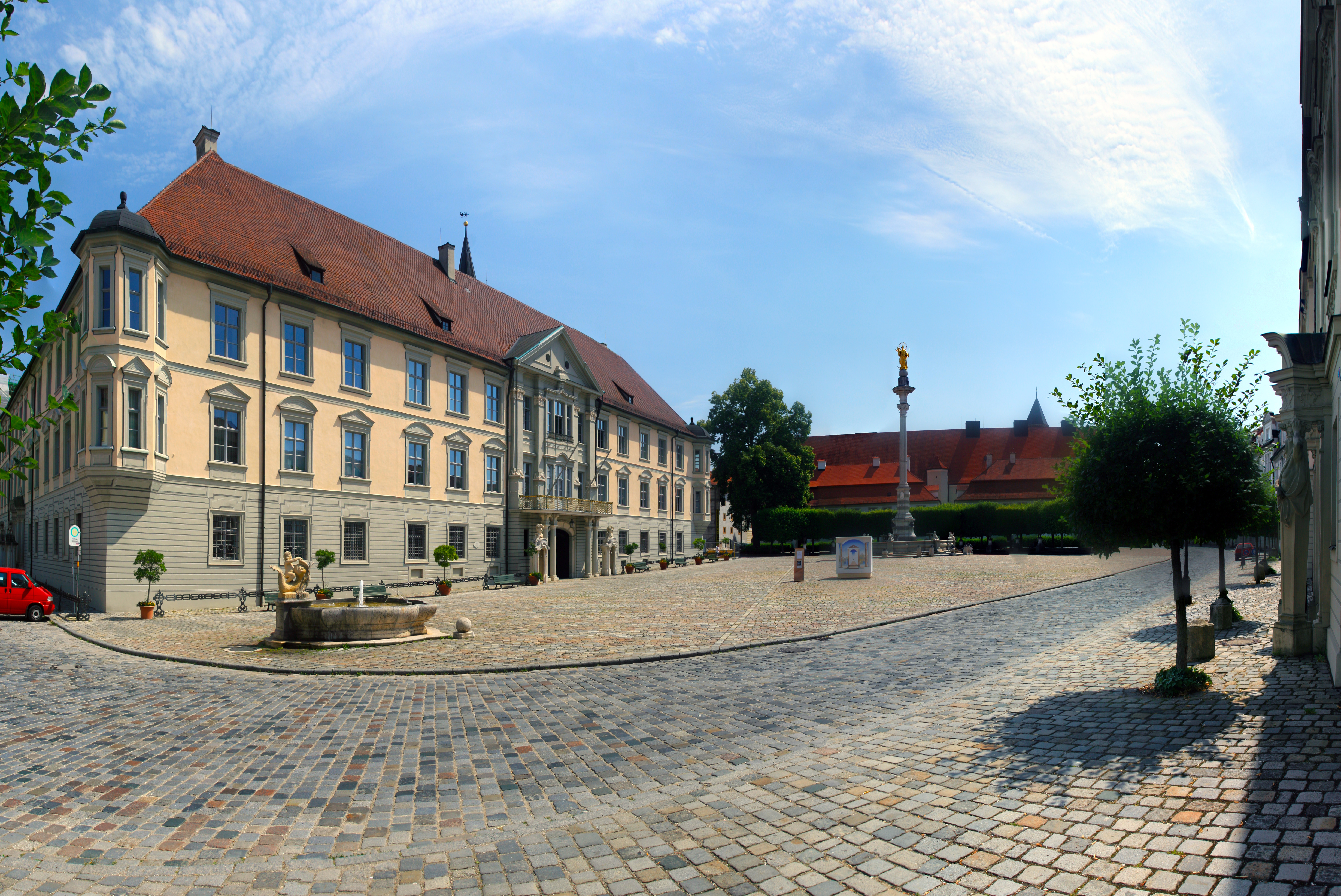 Eichstätt